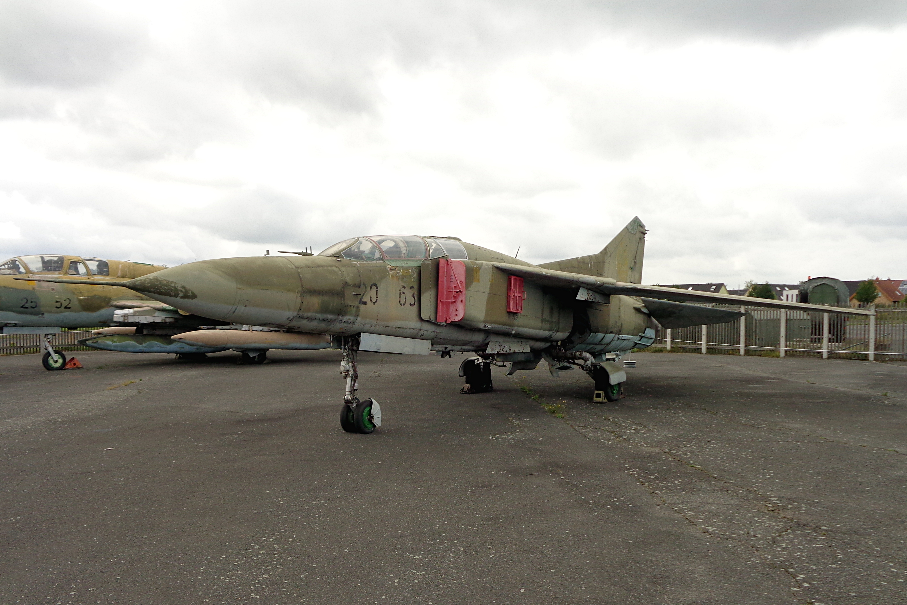 Mikoyan-Gurevich MiG-23 en el MHM Gatow.